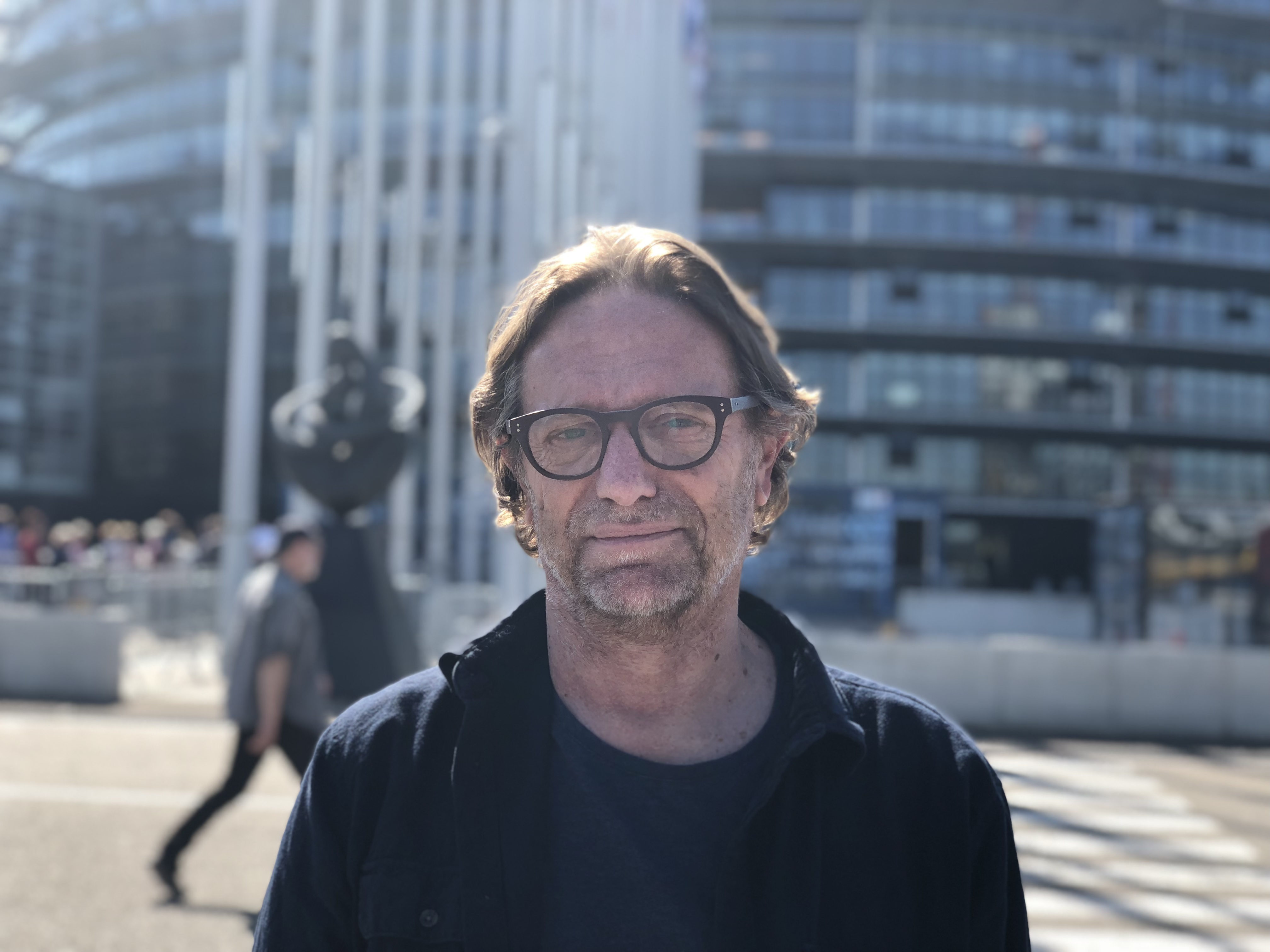 Eric van Tijn voor het Europees Parlement